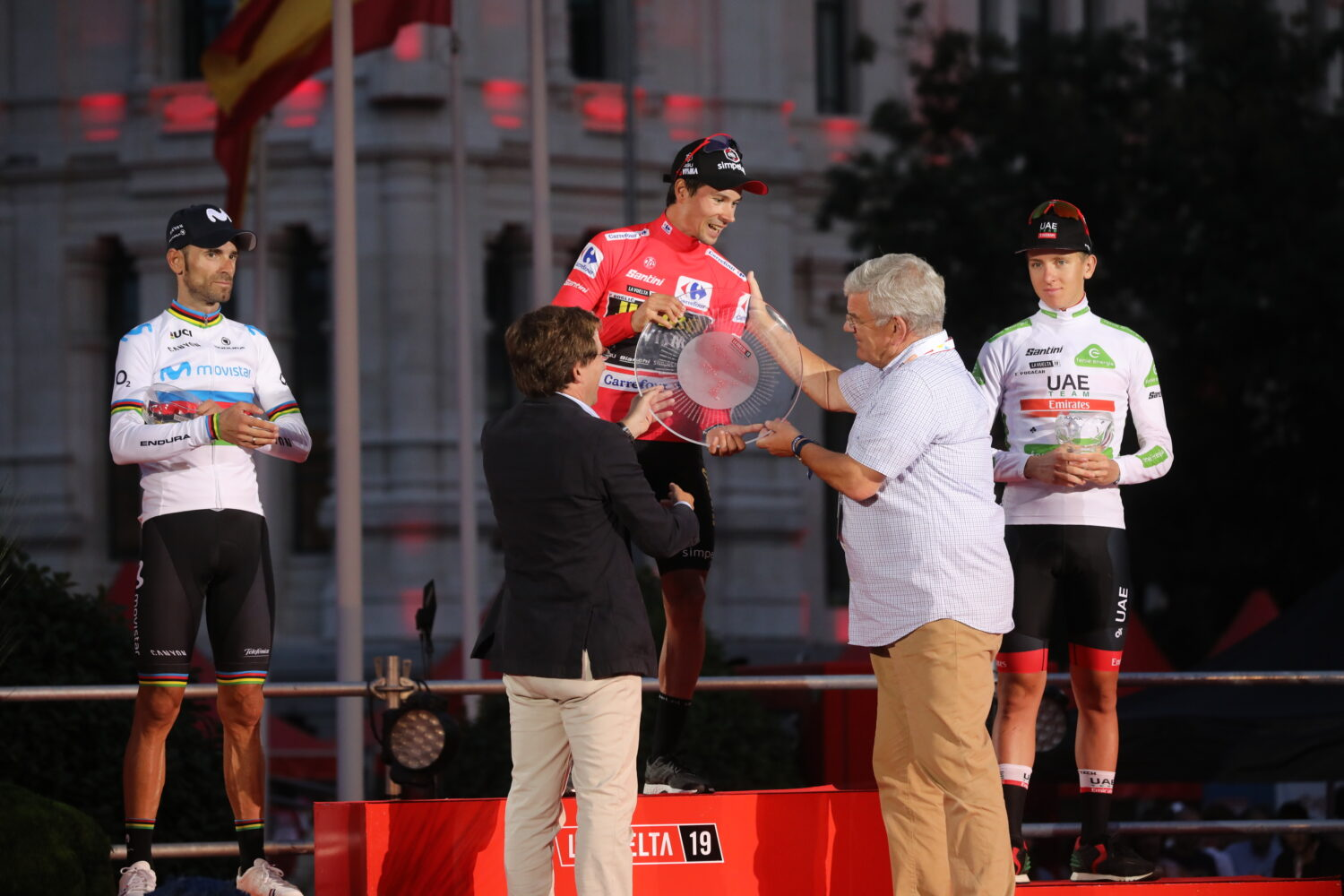 Tras 21 etapas, Primoz Roglic se ha declarado vencedor de la 74ª edición de la vuelta 15/09/2019 El alcalde de Madrid, José Luis Martínez-Almeida, ha entregado el primer premio de La Vuelta Ciclista a España 2019 a Primoz Roglic, en el podio situado en Cibeles.